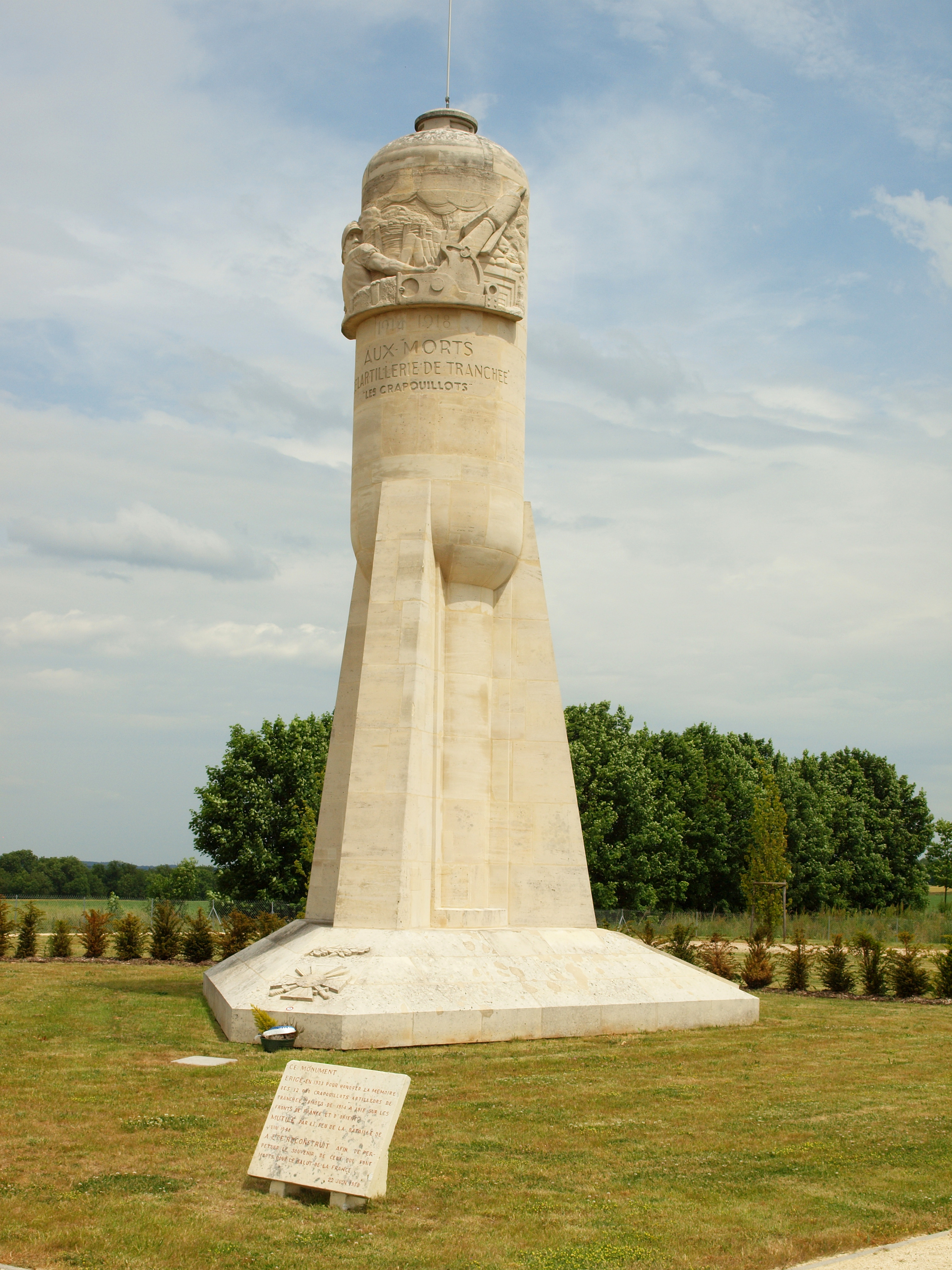 Jardin mémorial du Moulin de Laffaux (Aisne, France)